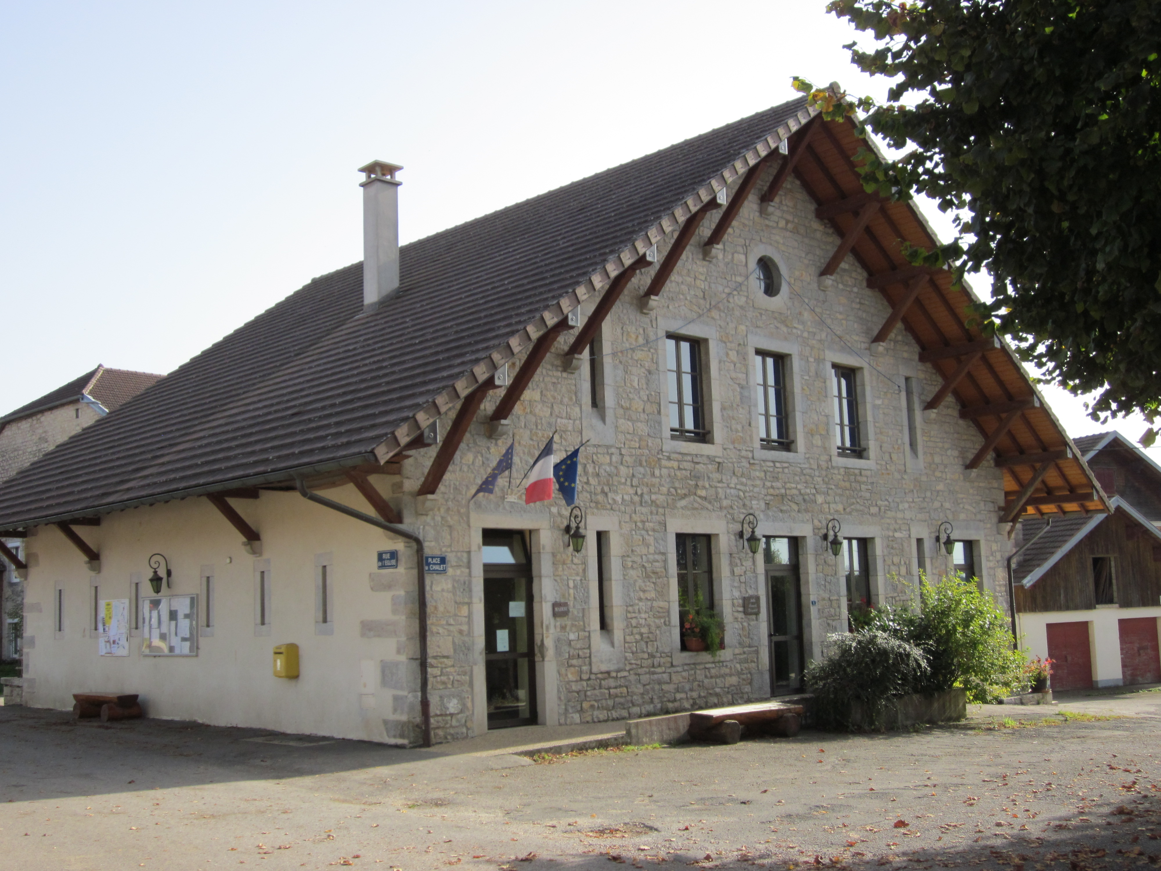 mairie de Besain - Jura